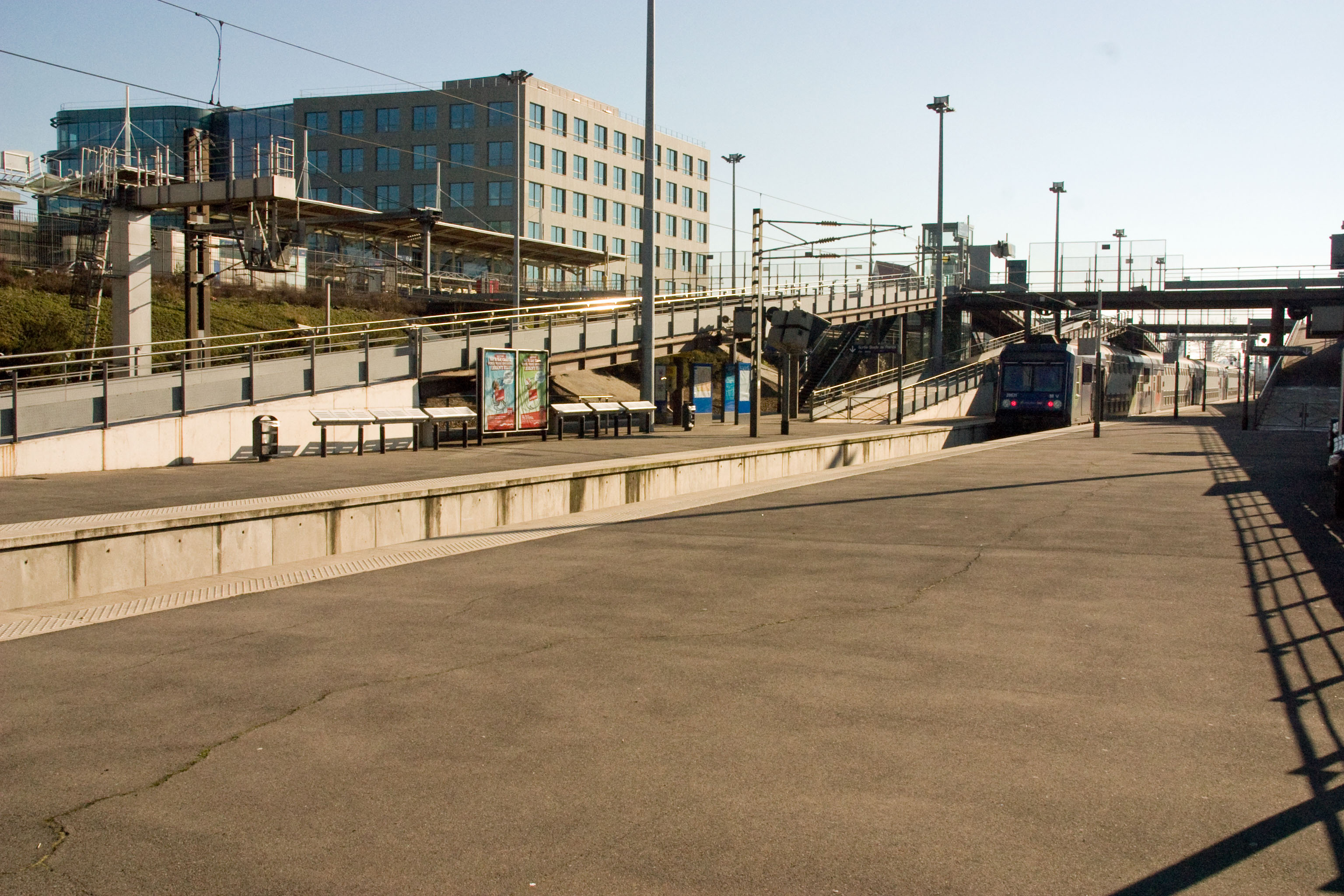 Gare du Stade de France - Saint-Denis, Saint-Denis, département de la Seine-Saint-Denis (France)